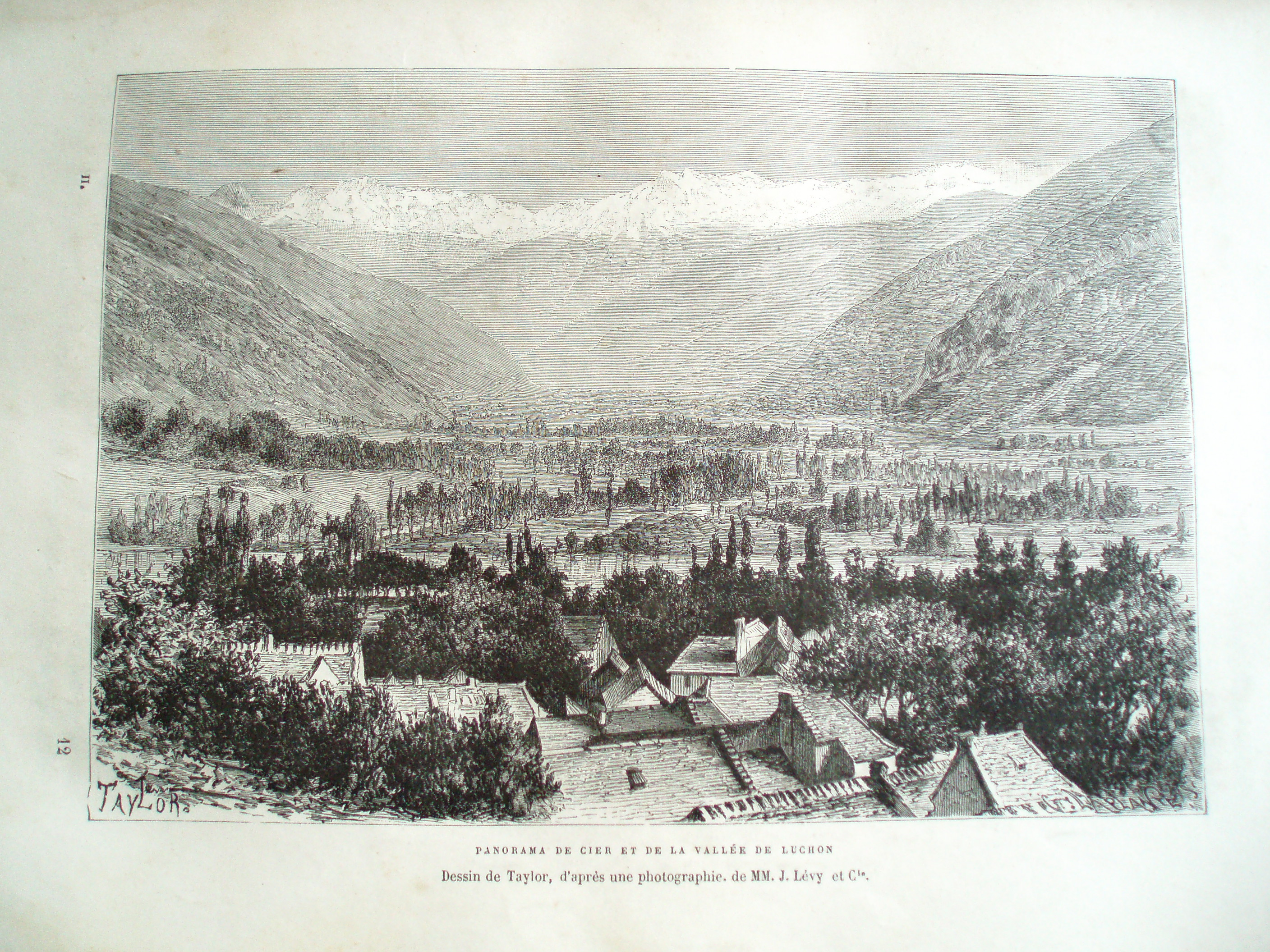 Panorama de Cier et de la vallée de Luchon (Pyrénées), dessin de Taylor, d'après une photographie de J. Lévy et Cie, in: Élisée Reclus, Nouvelle géographie universelle, t.2: La France, 1877, p. 89.